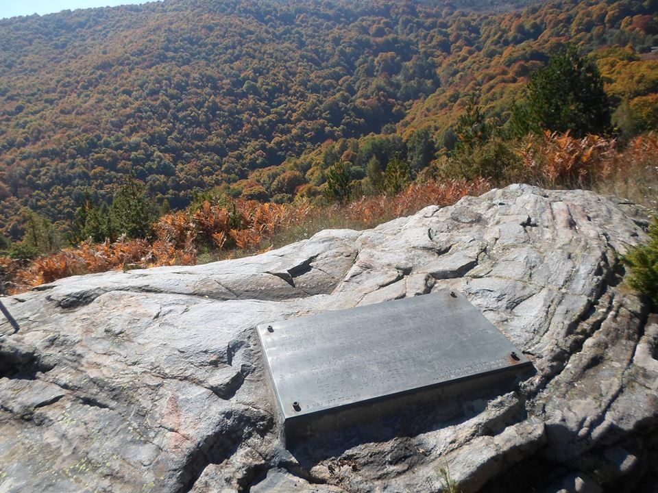 Спомен плоча на местото каде што е разбиен Битолскиот партизански одред „Пелистер“